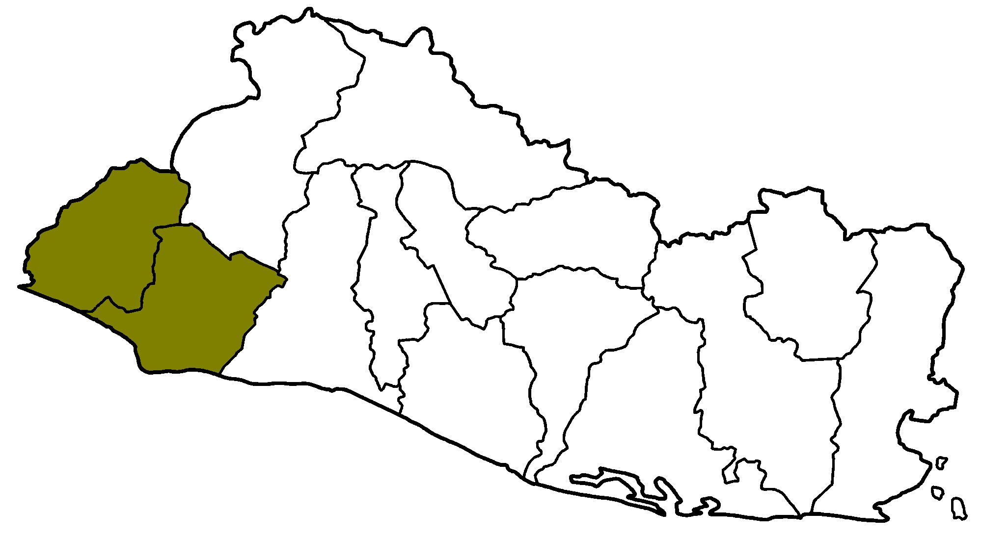 Este archivo fue creado copiando de File:El Salvador departments blank.png y luego editado en el programa paint. fue hecho por Juan Miguel Esta imagén muestra el territorio de la Alcaldía Mayor de Sonsonate (1540 - 1824).